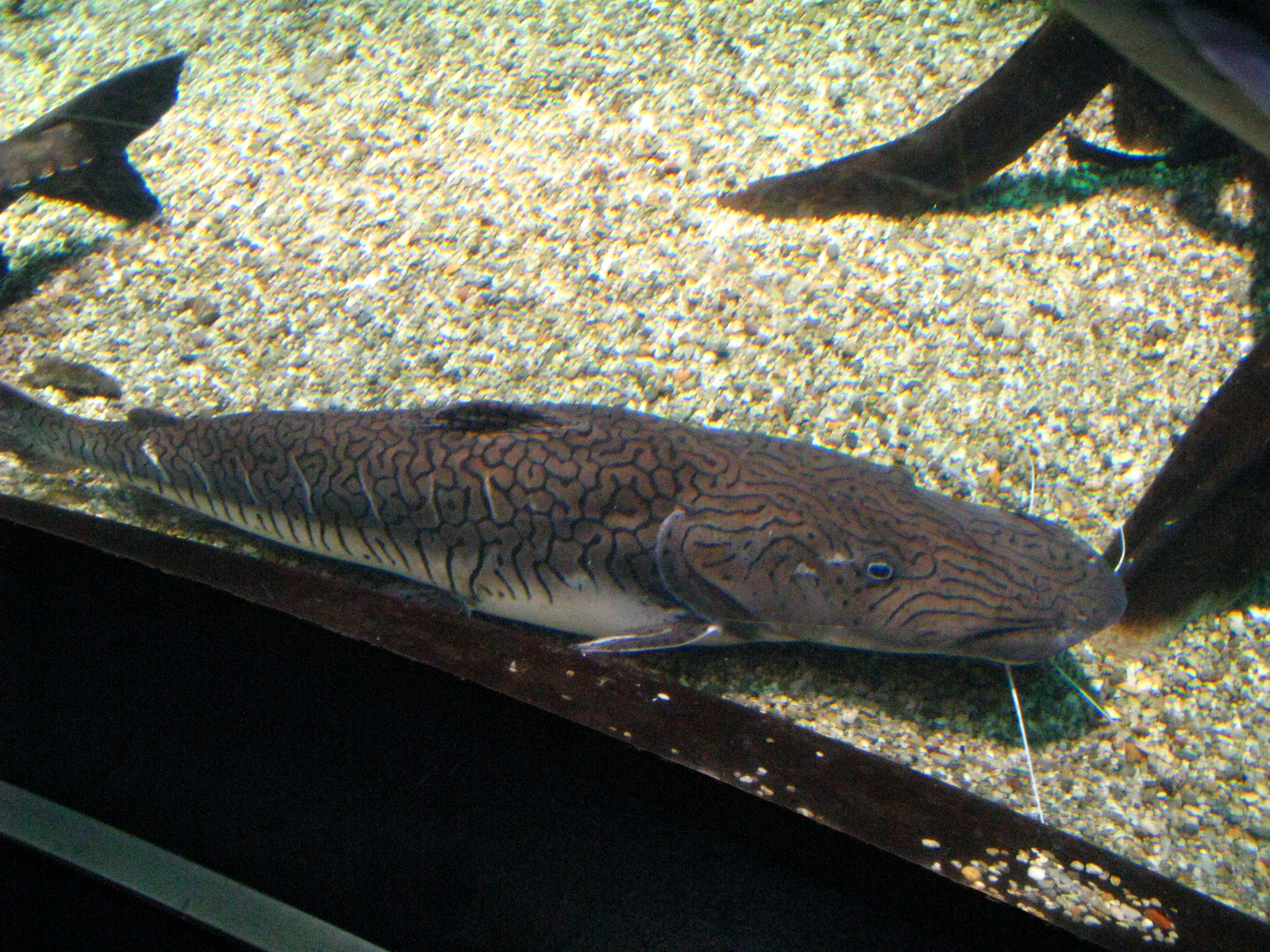 Scientific name Pseudoplatystoma fasciatum